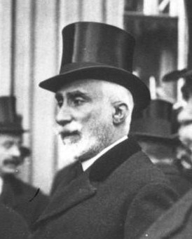 Antonio Maura, presidente del gobierno de España, en 1913.